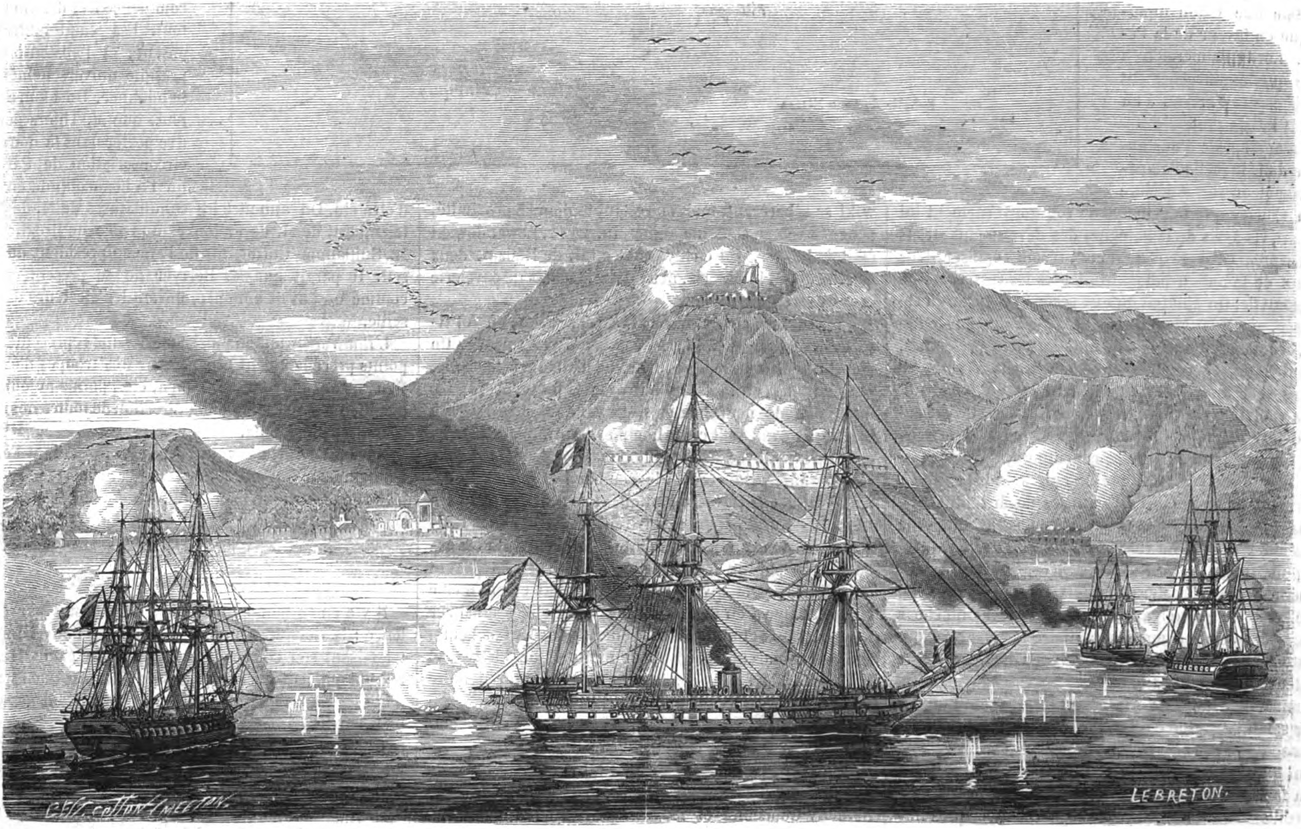 Expédition du Mexique. — Entrée de la division française dans la rade d'Acapulco, le 10 Janiver 1863. — D'après un croquis de M. H. H., aspirant de marine.